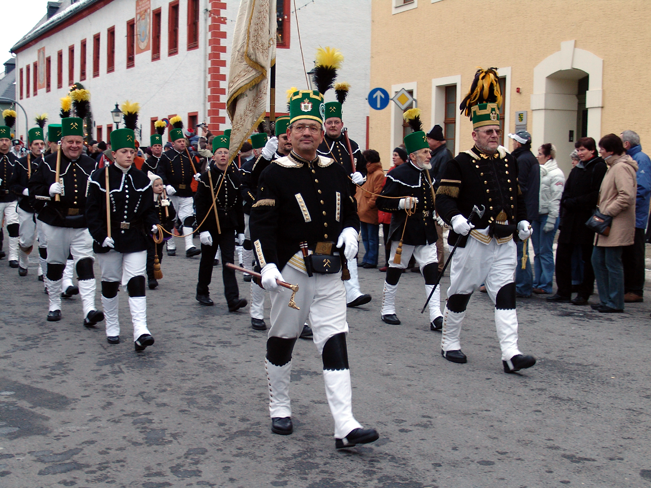 Bergparade in Marienberg/Erzgebirge am 3. Advent 2005. Bergknapp- und Brüderschaft „Glück Auf“ Frohnau/Erzgebirge